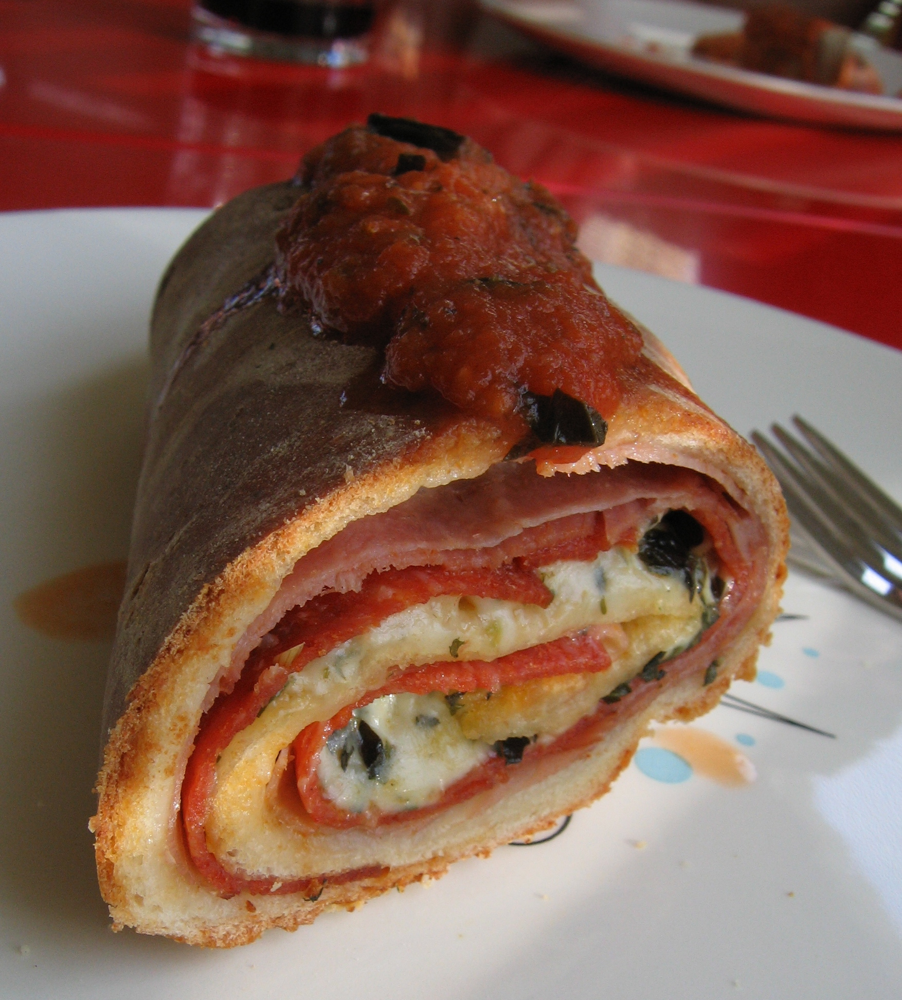 Homemade stromboli.